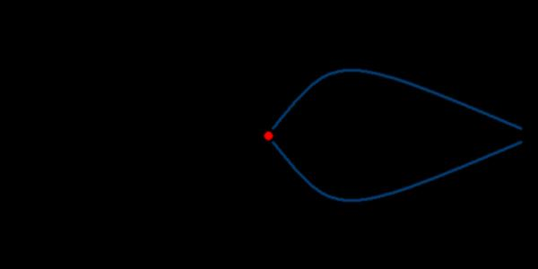 Blue Arc Phenomenon fuer rechtes Auge